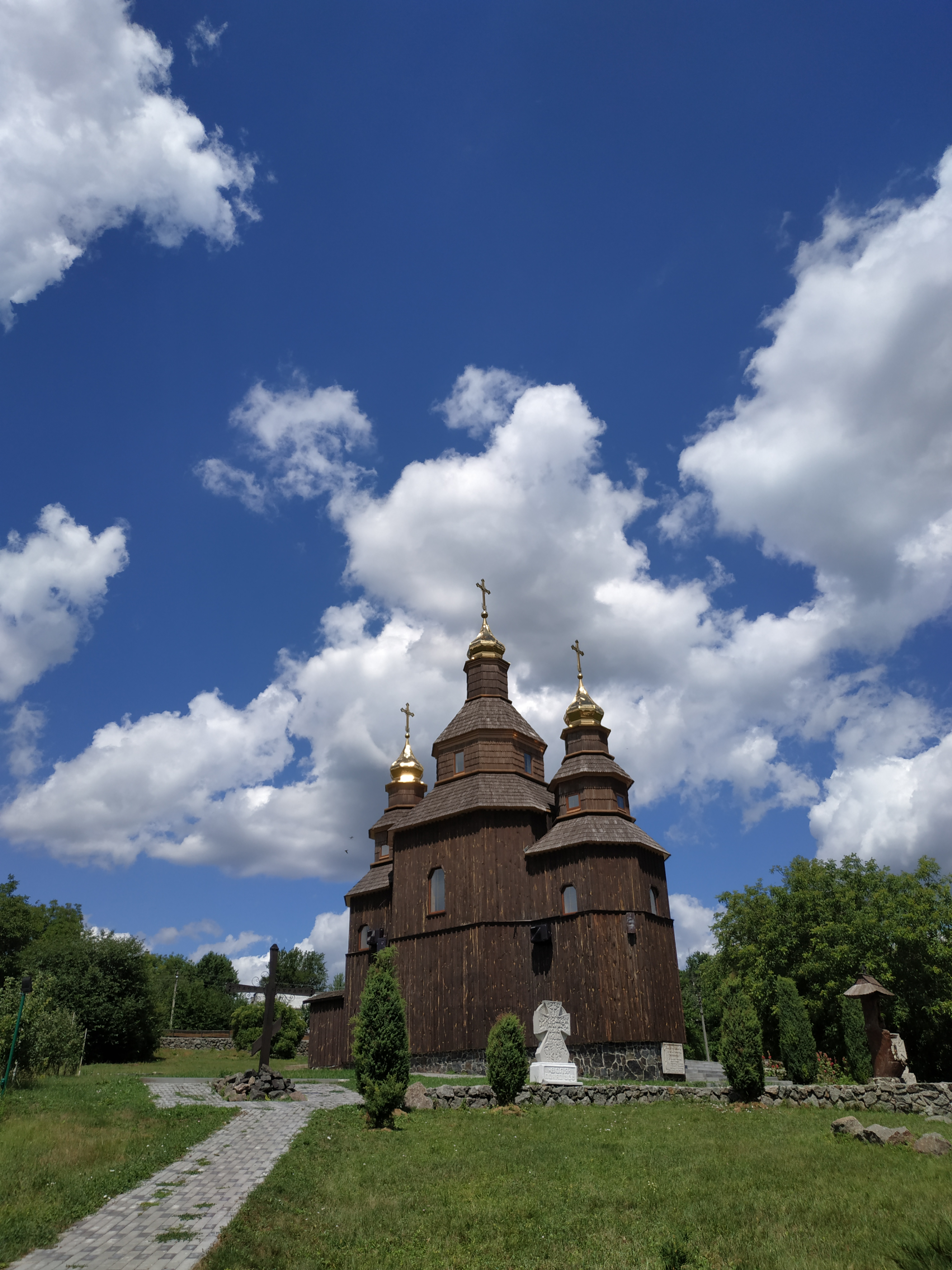 хутір Буда. 2019